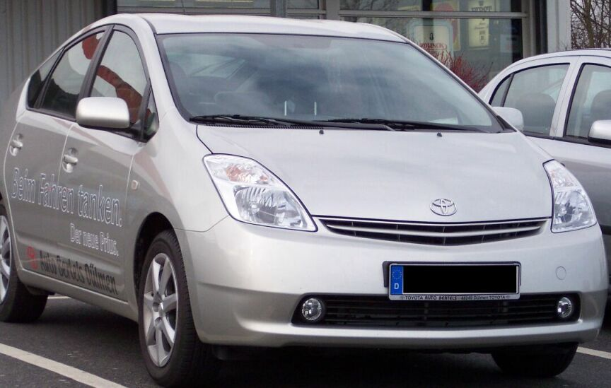 Toyota Prius, erstes Serienfahrzeug mit Hybridantrieb